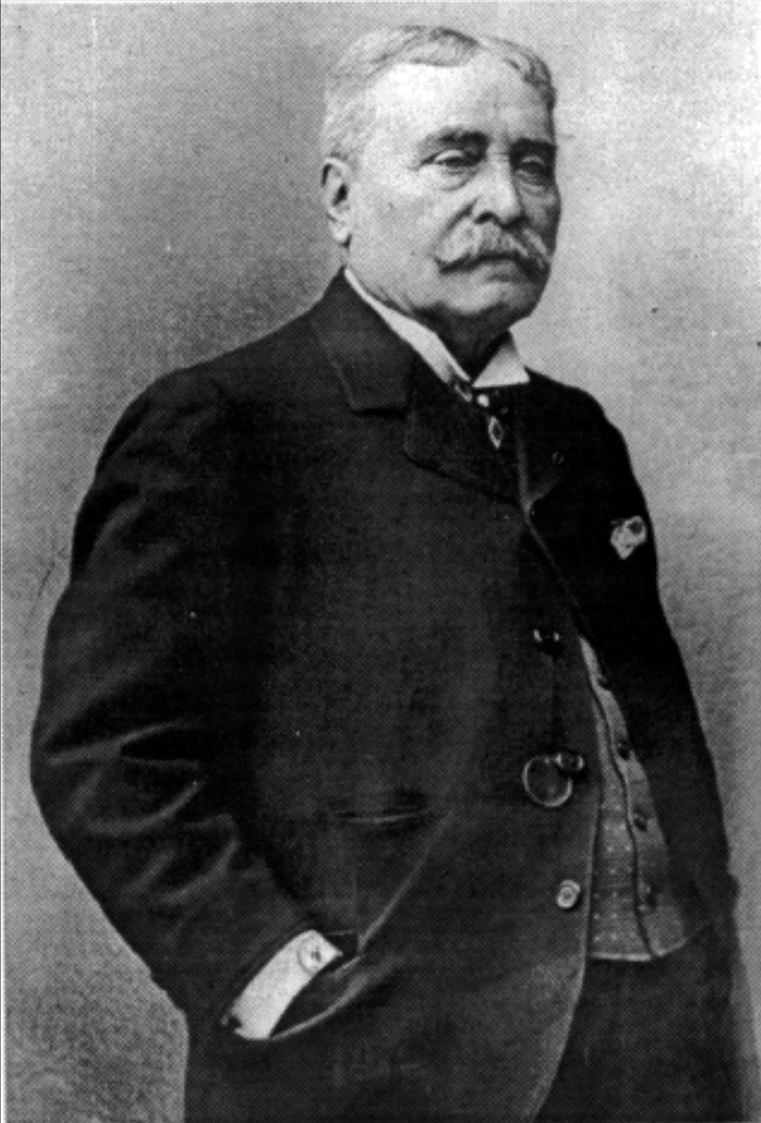 Foto von Daniel Iffla